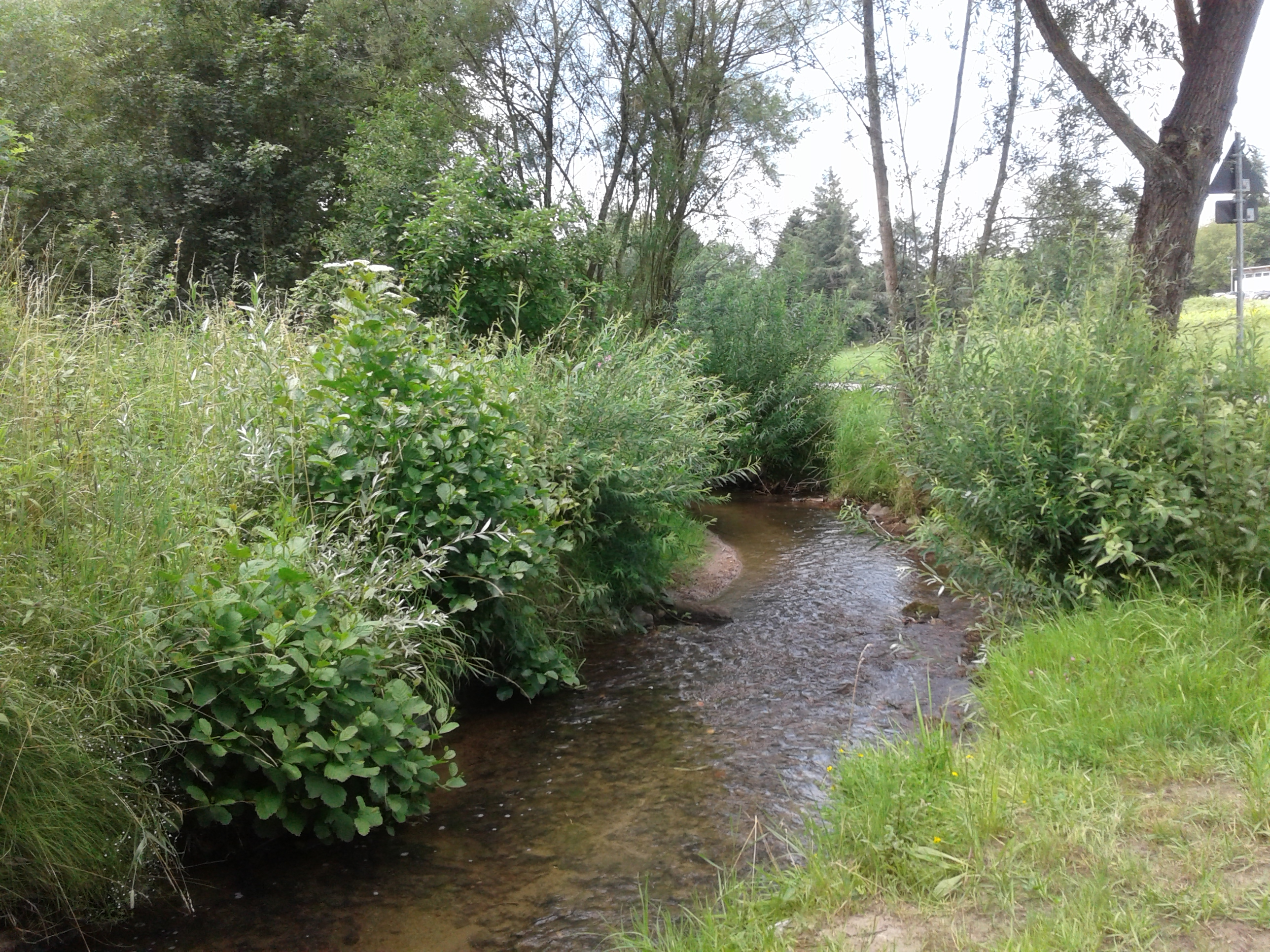 Krumbach am südlichen Ortsrand von Krumbach(Schwaben). Blickrichtung Nordwesten. Lage:48°14'03.3"N 10°21'52.2"E